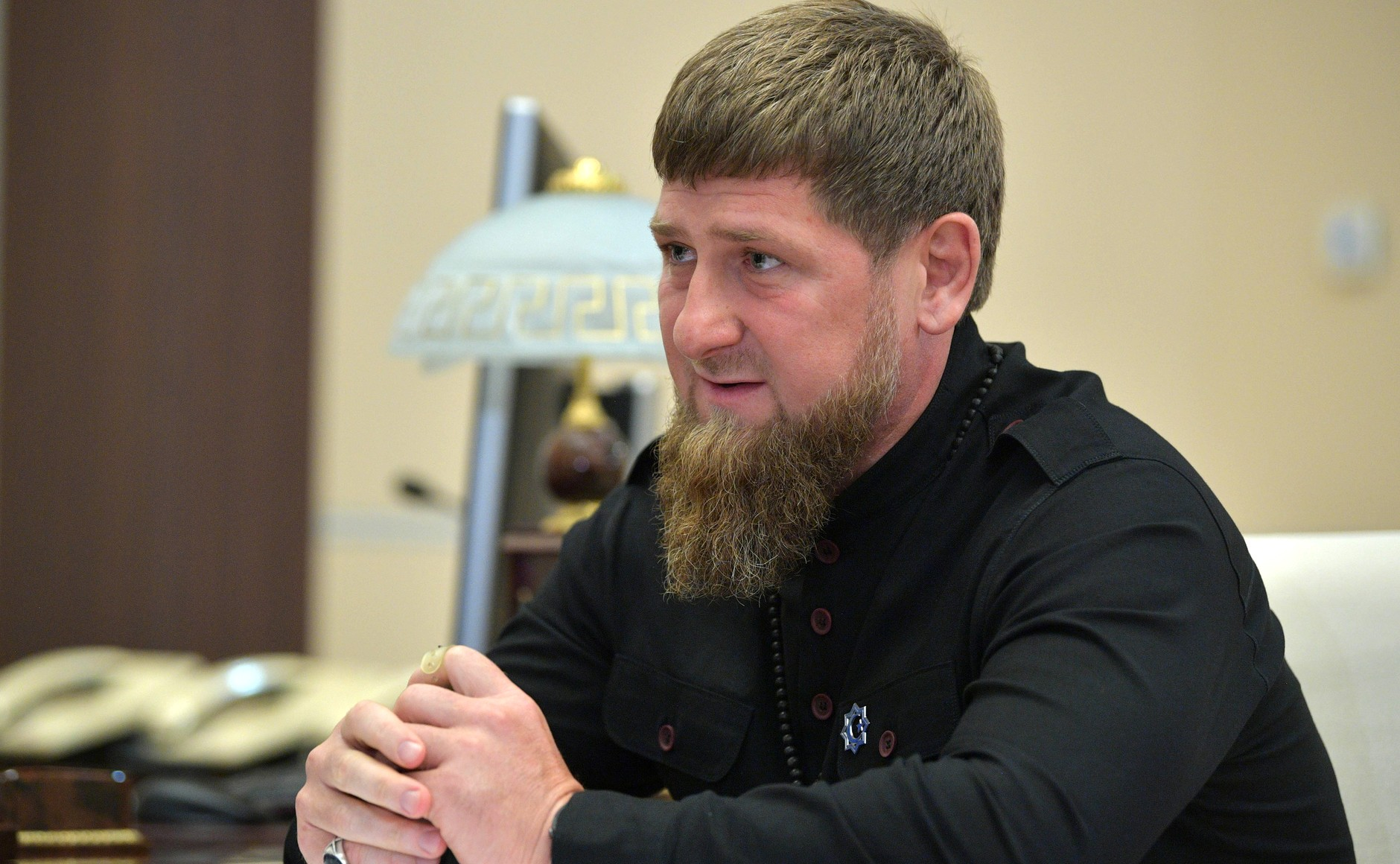 Глава Чеченской Республики Рамзан Кадыров во время рабочей встречи с Президентом России Владимиром Путиным